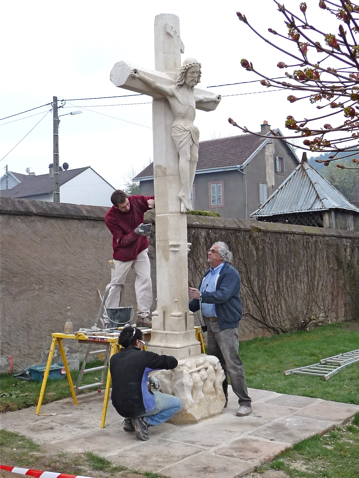 repose de la croix Notre-Dame à l'entrée du cimetière de Raon-l'Étape (88110), en avril 2010